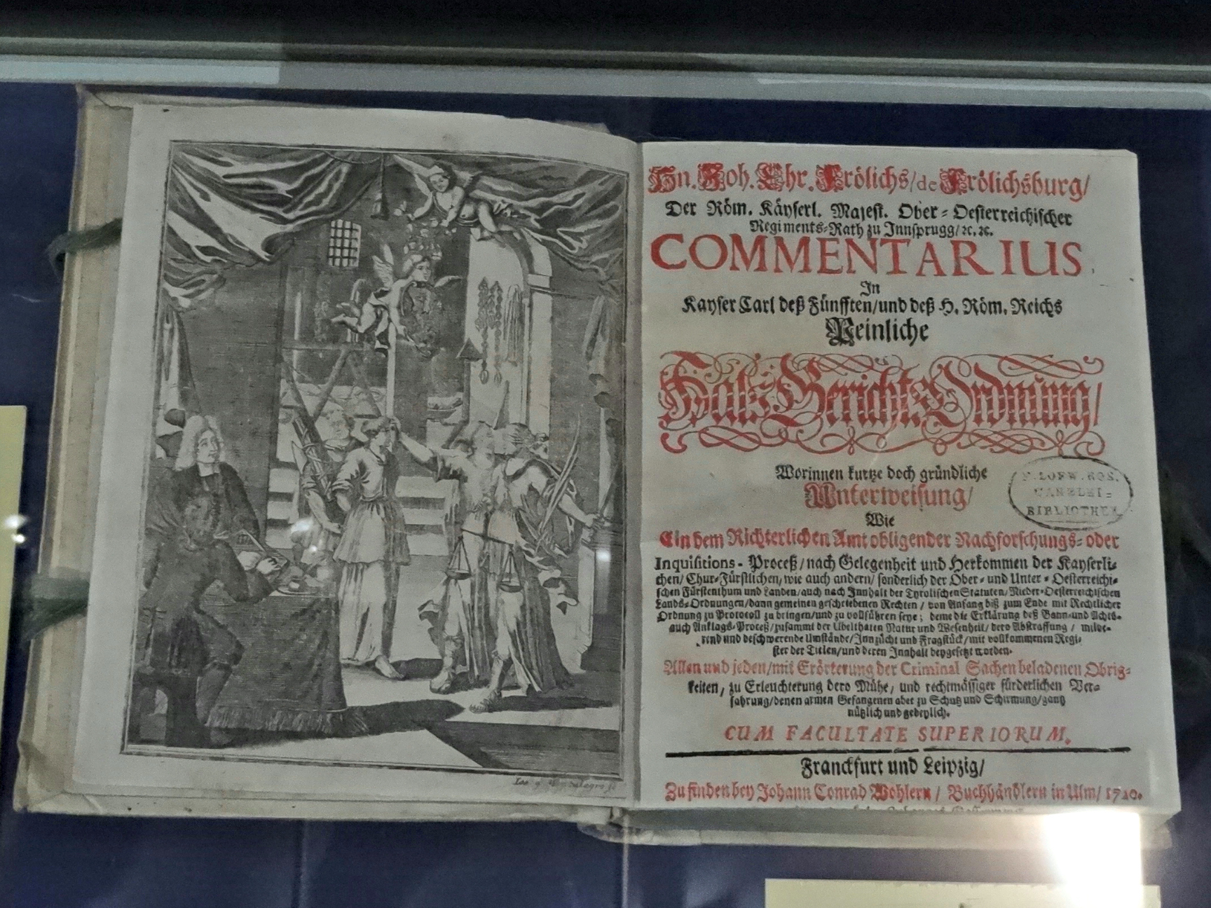 Johann Christoph Frölich von Frölichsburg: Commentarius In Kayser Carl des Fünfften / und deß H. Röm. Reichs Peinliche HalsGerichtsOrdnung, Ulm 1733, Reichskammergerichtsmuseum Wetzlar: "Einen weitverbreiteten Kommentar zur Carolina verfasste Johan Christoph Frölich von Frölichsburg, der als Professor der Rechte und Regimentsadvokat in Wien wirkte. Sein Kommentar enthielt neben Ausführungen zu Delikten und Strafen auch praktische Anleitungen zur Durchführung des Inquisitionsverfahrens" (Hinweistafel)